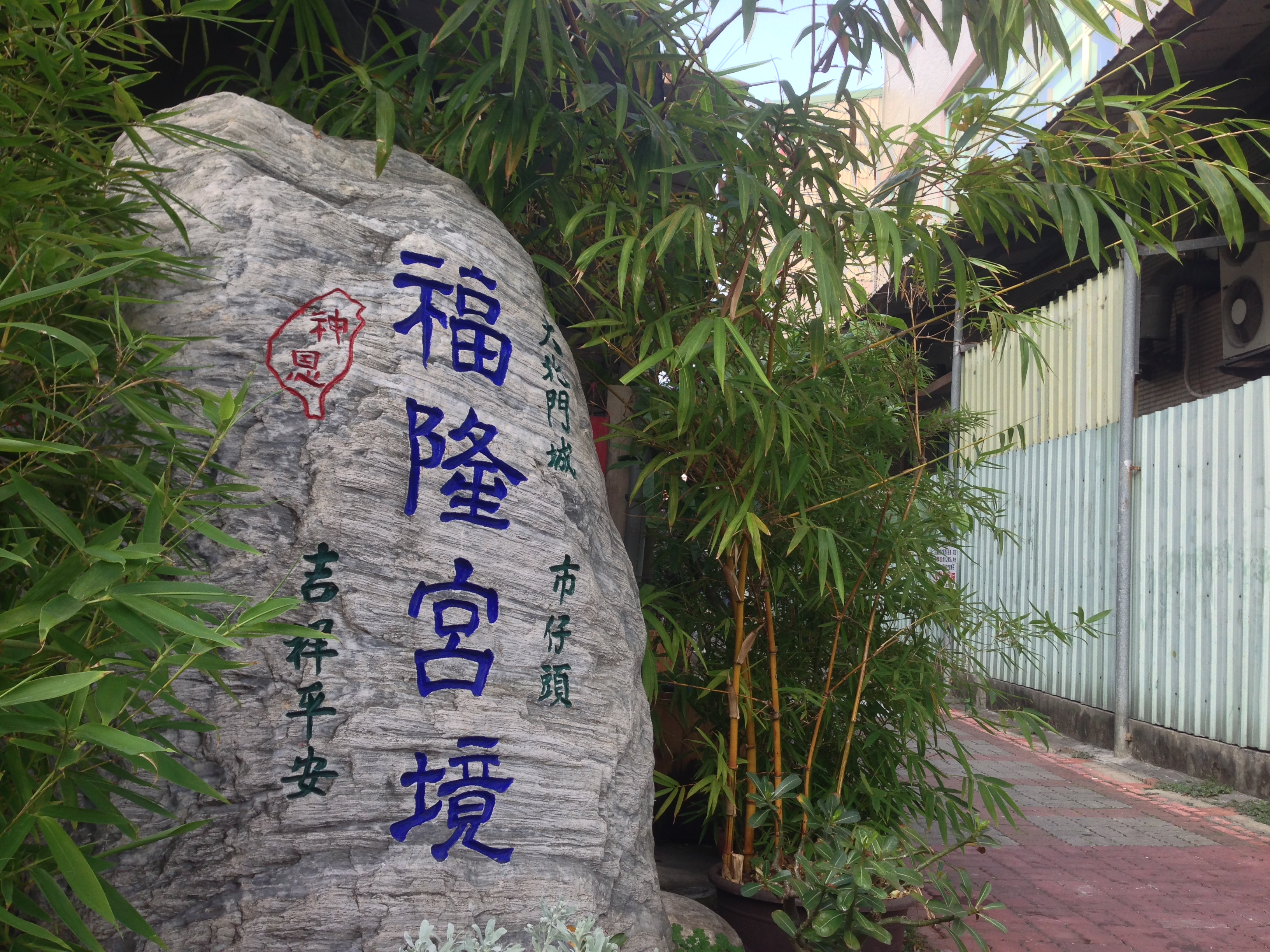 中文（台灣）: 市仔頭福隆宮境石